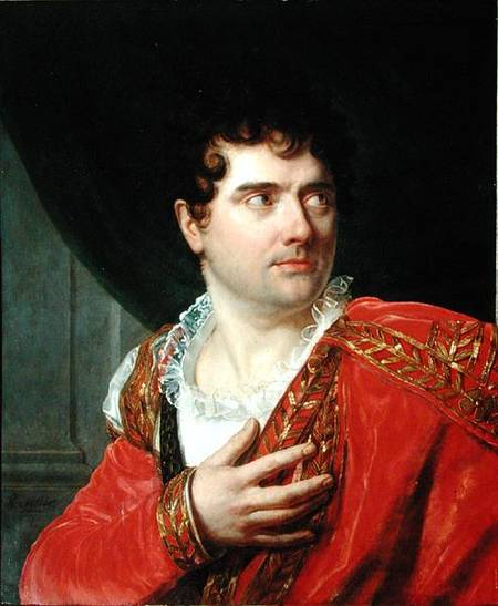 Henri-François Riesener (1767-1828): Portrait de François-Joseph Talma, vers 1824, reproduction d'après l'original conservé au Musée Marmottan, Paris, France.